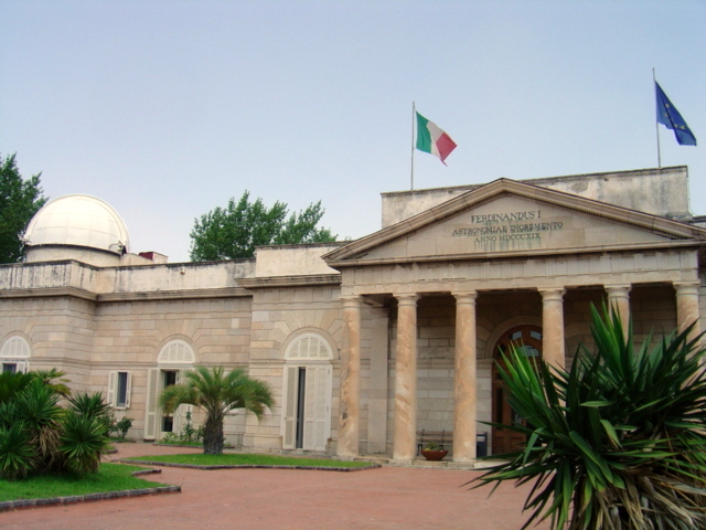 Observatory Capodimonte